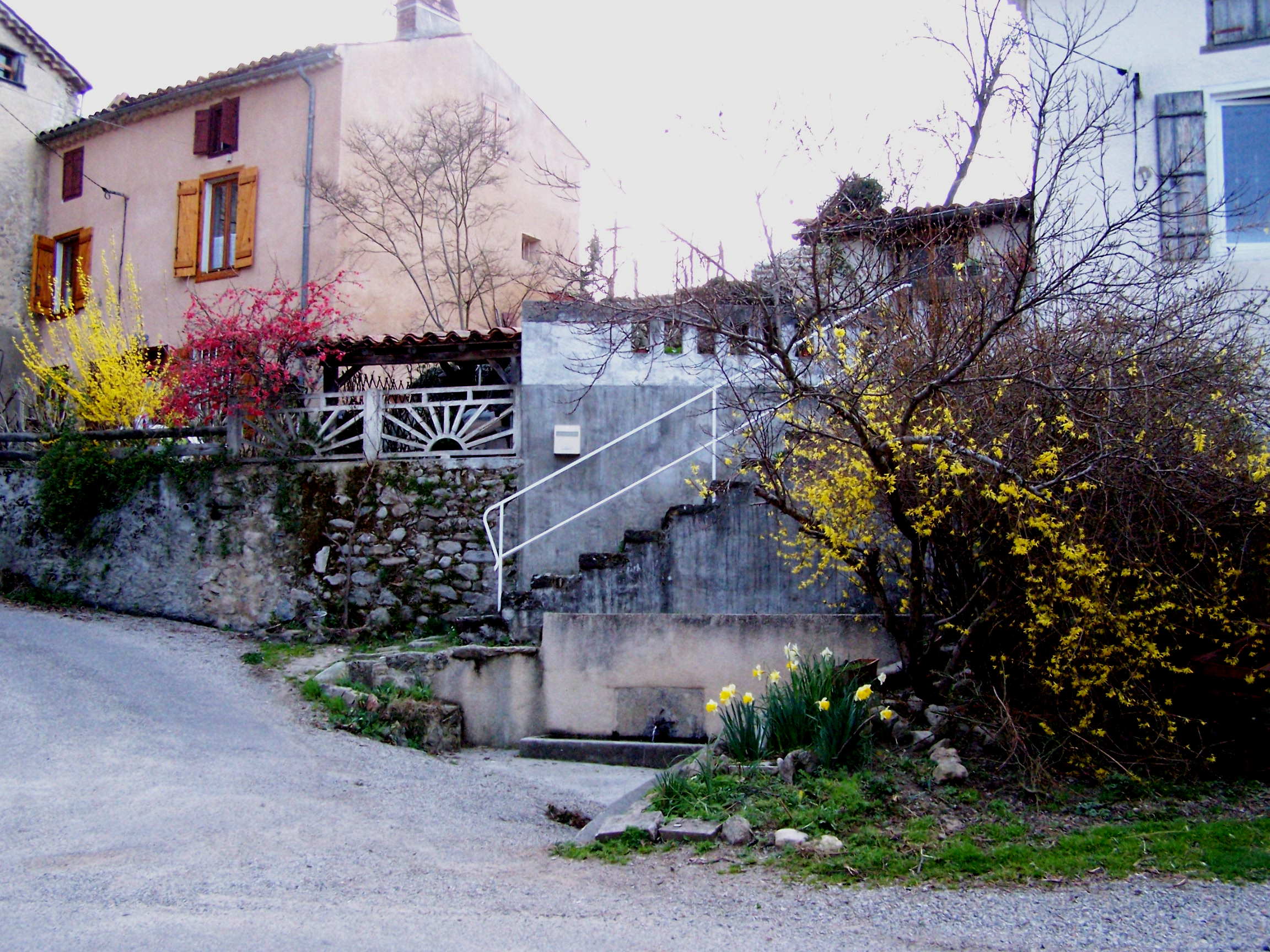 Fontaine à l' entrée du hameau de Lacassagne, à Ganac dans la vallée de la Barguillière (Ariège).